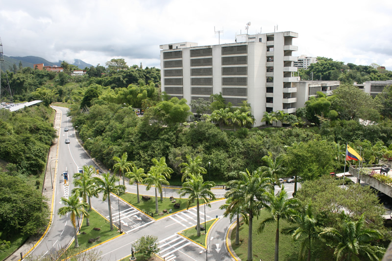 Campus Santa Maria